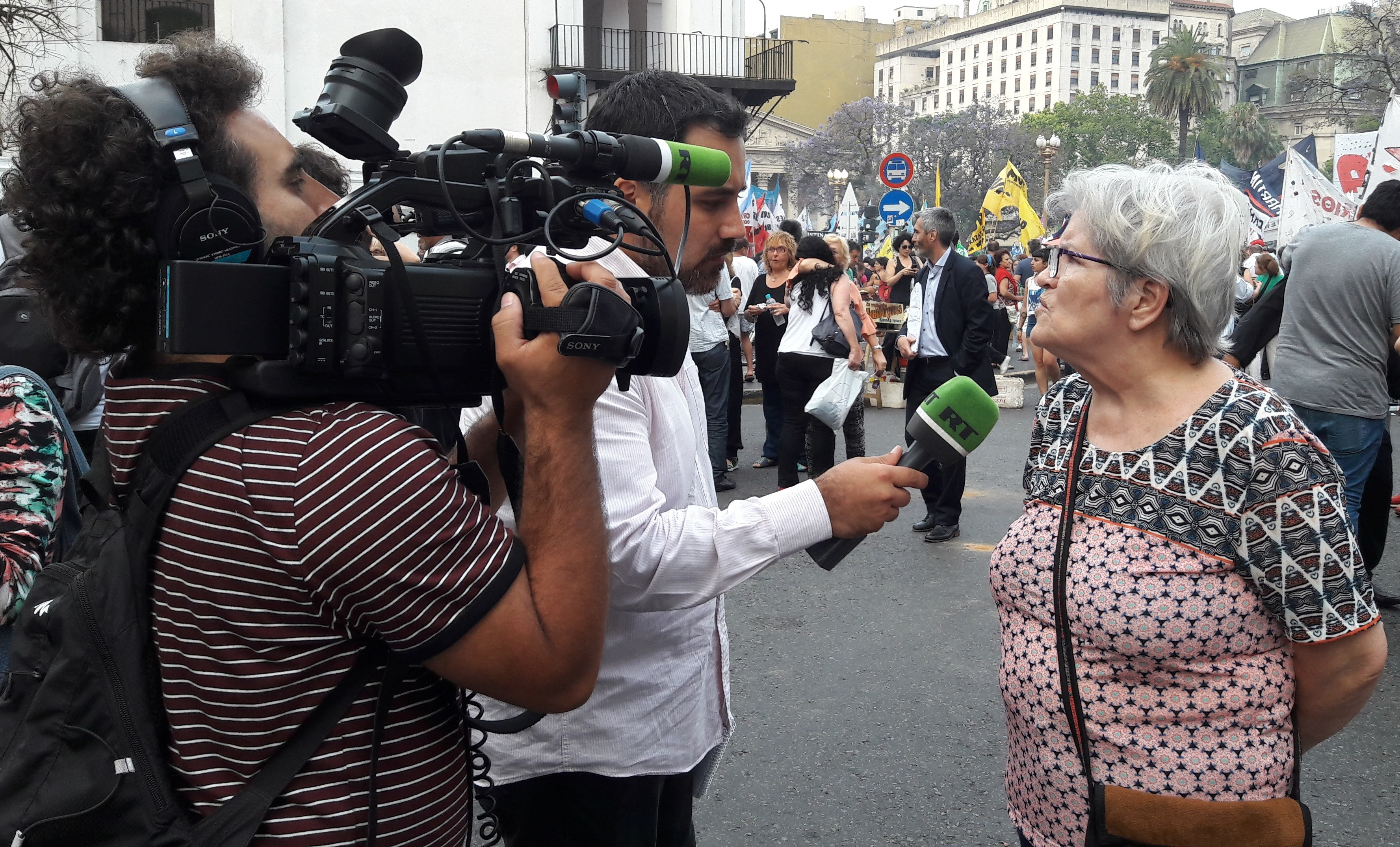 Corresponsal de RT en Español en Buenos Aires, Argentina, cubriendo la Marcha de la Resistencia de 2017.